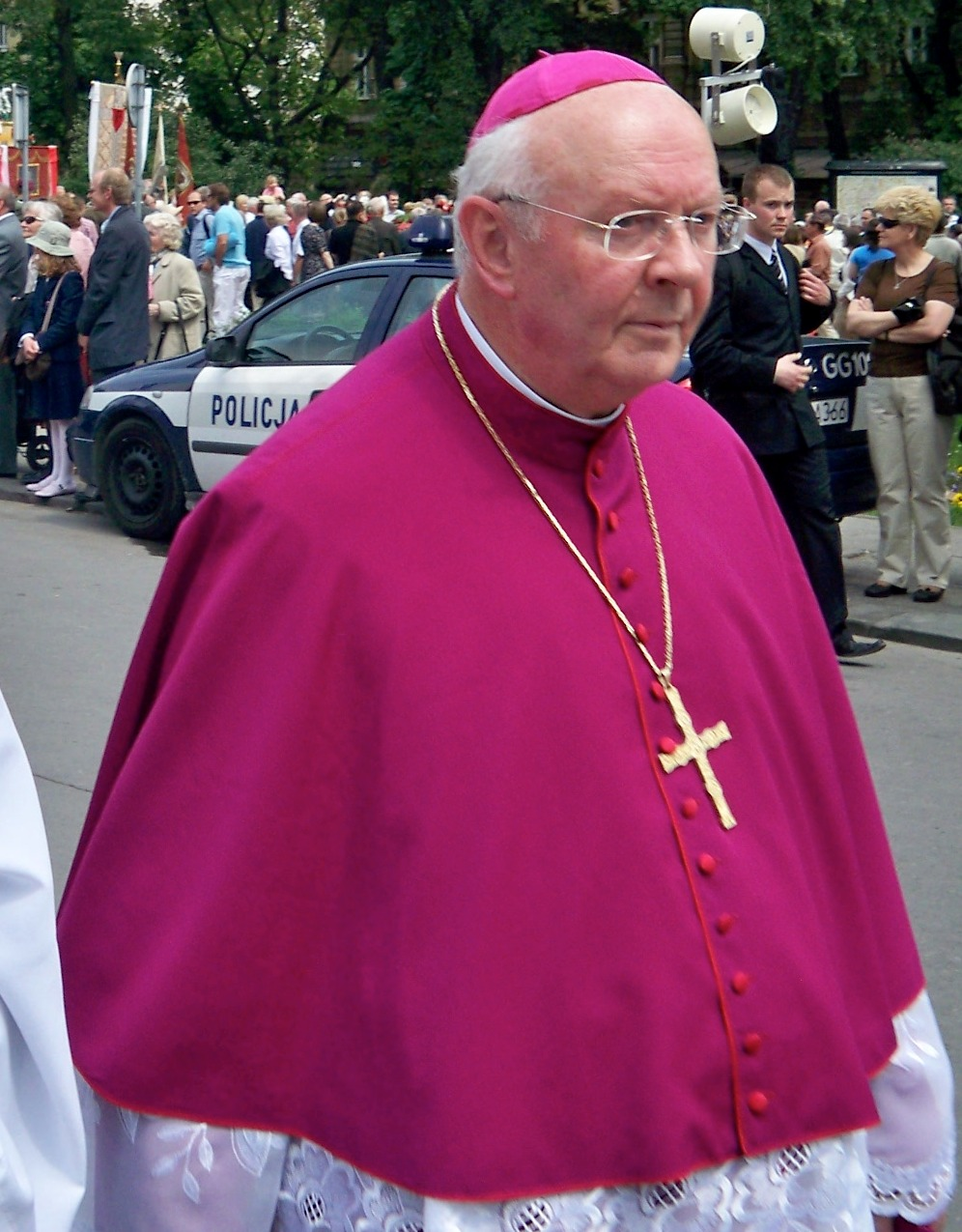 Abp. Władysław Ziołek